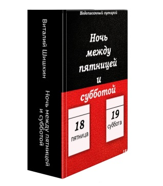 Книга о свингер-клубах, и БДСМ-увлечениях. Москва — это столица разврата Мира, за фасадами церквей — самое большое количество гей-клубов и свингер-вечеринок в Европе. Чиновники и политики, депутаты и священнослужители, полицейские и судьи, артисты и журналисты — всех можно встретить в этих злачных местах. Но главное в книге — это любовь. Только она может быть основой взаимоотношений. Всё, что вы прочитаете, основано на реальных событиях.